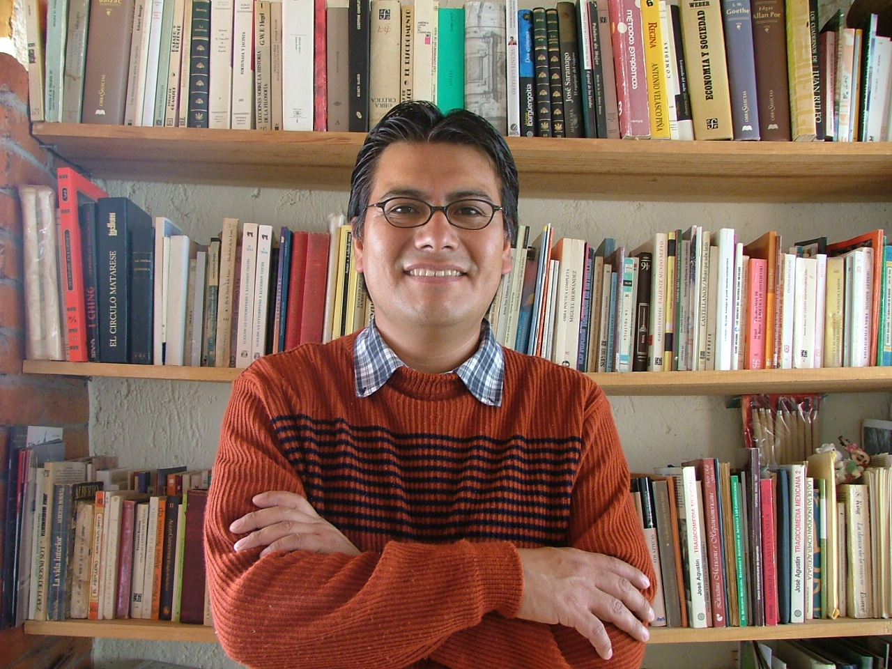 Moisés Zurita foto del 2006